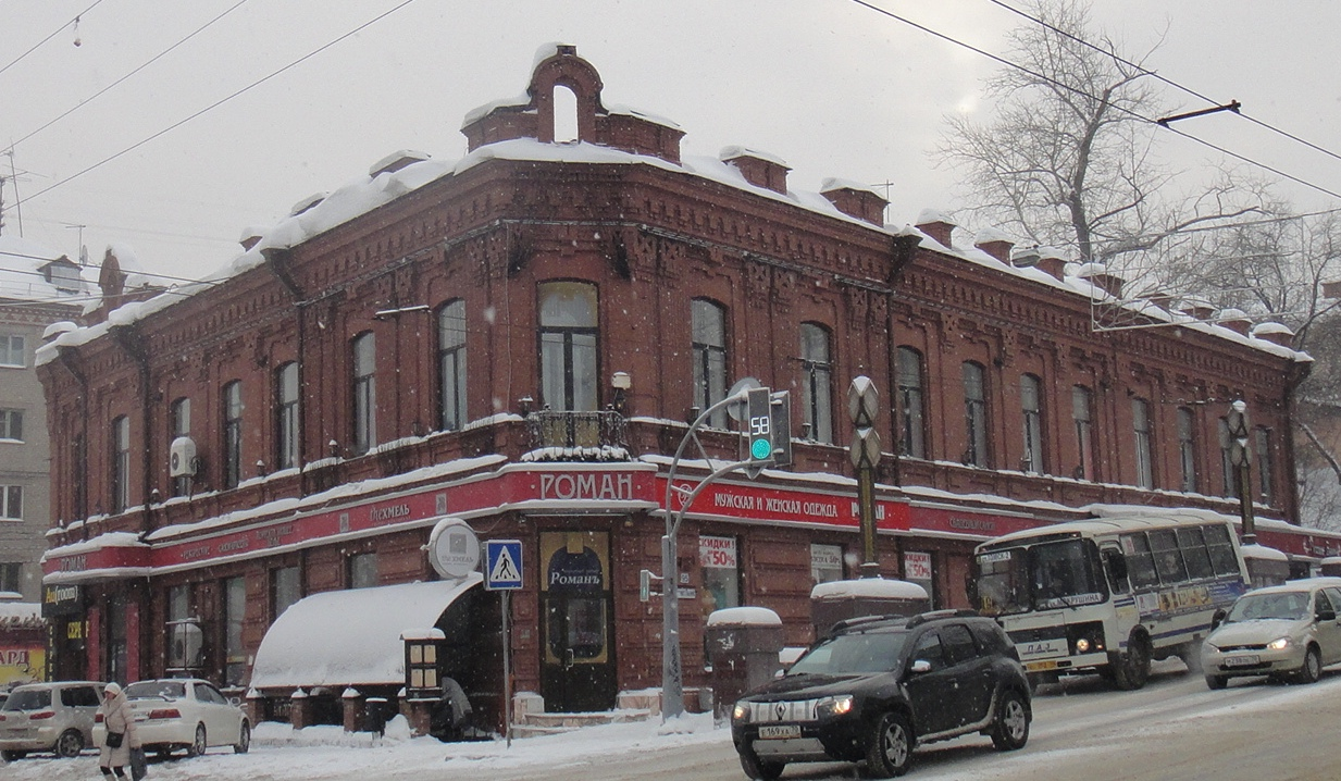 проспект Ленина в Томске, д. 95